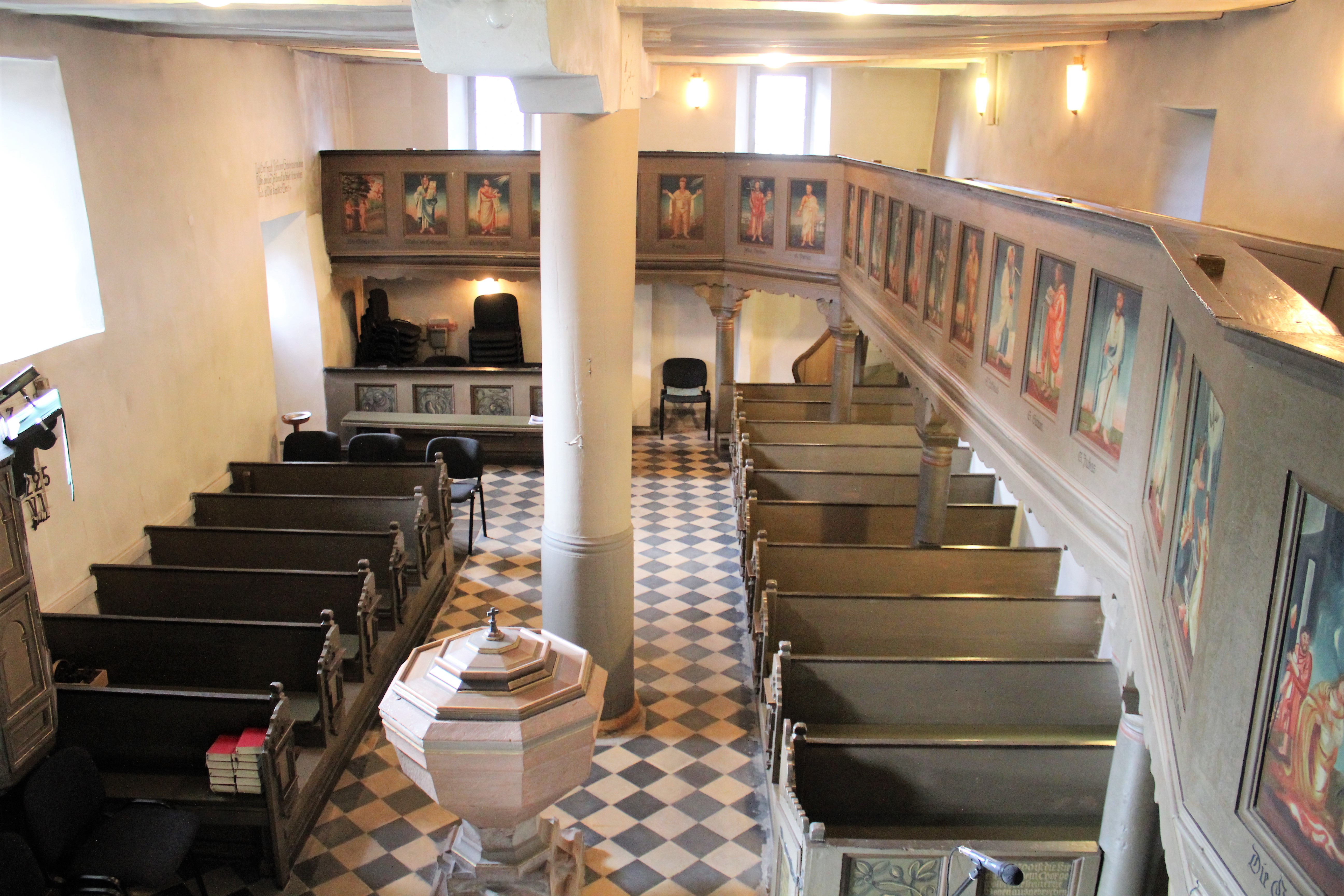 Evanglische Kirche Rodenhausen, Gemeinde Lohra, Landkreis Marburg-Biedenkopf, Hessen, Deutschland